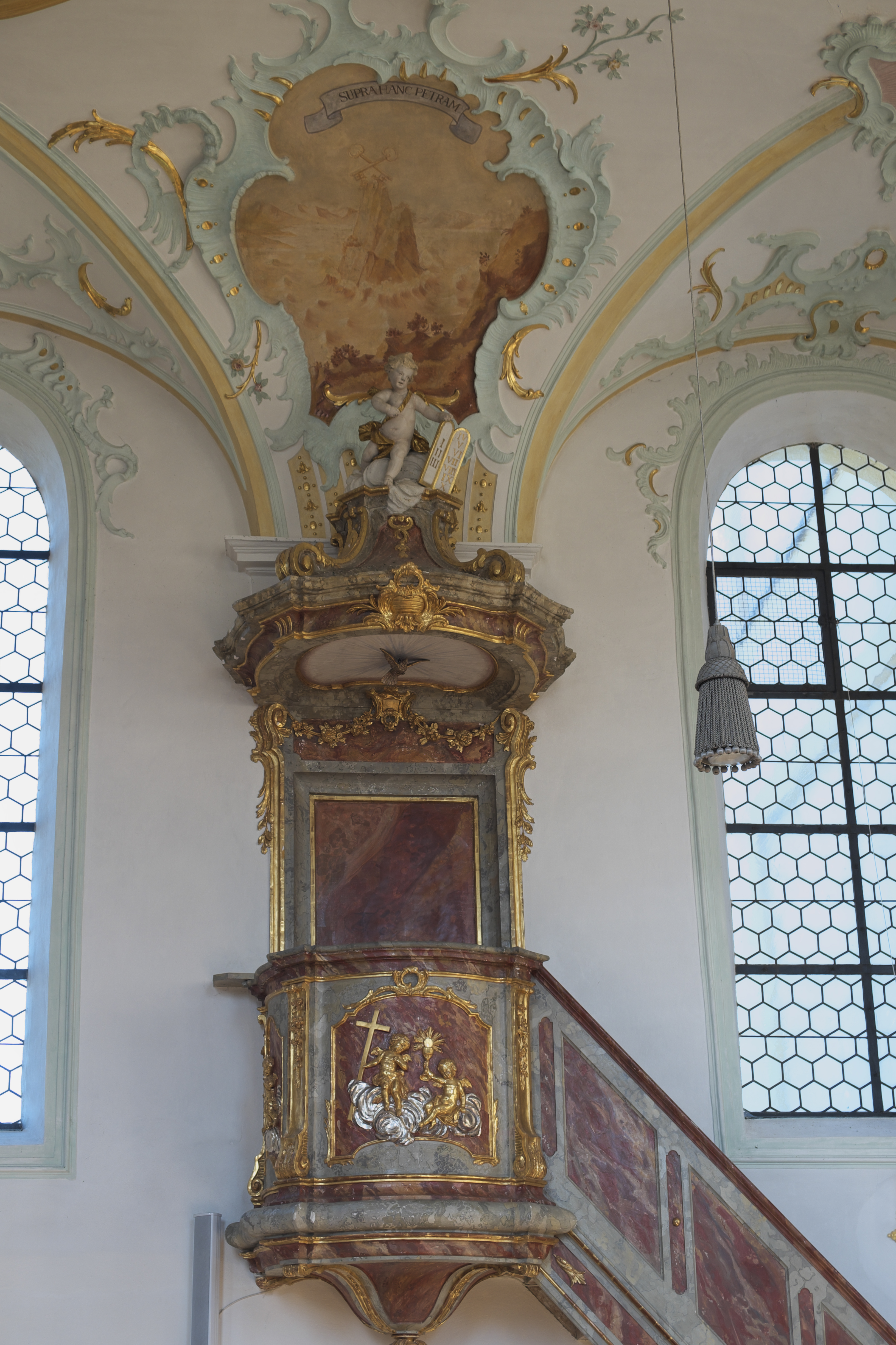 Katholische Pfarrkirche St. Petrus und Paulus in Petzenhausen, einem Ortsteil von Weil (Oberbayern) im Landkreis Landsberg am Lech (Bayern/Deutschland), Rokokokanzel